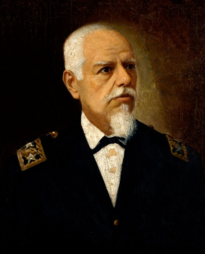 José Eloy Alfaro Delgado (June 25, 1842 – January 28, 1912)